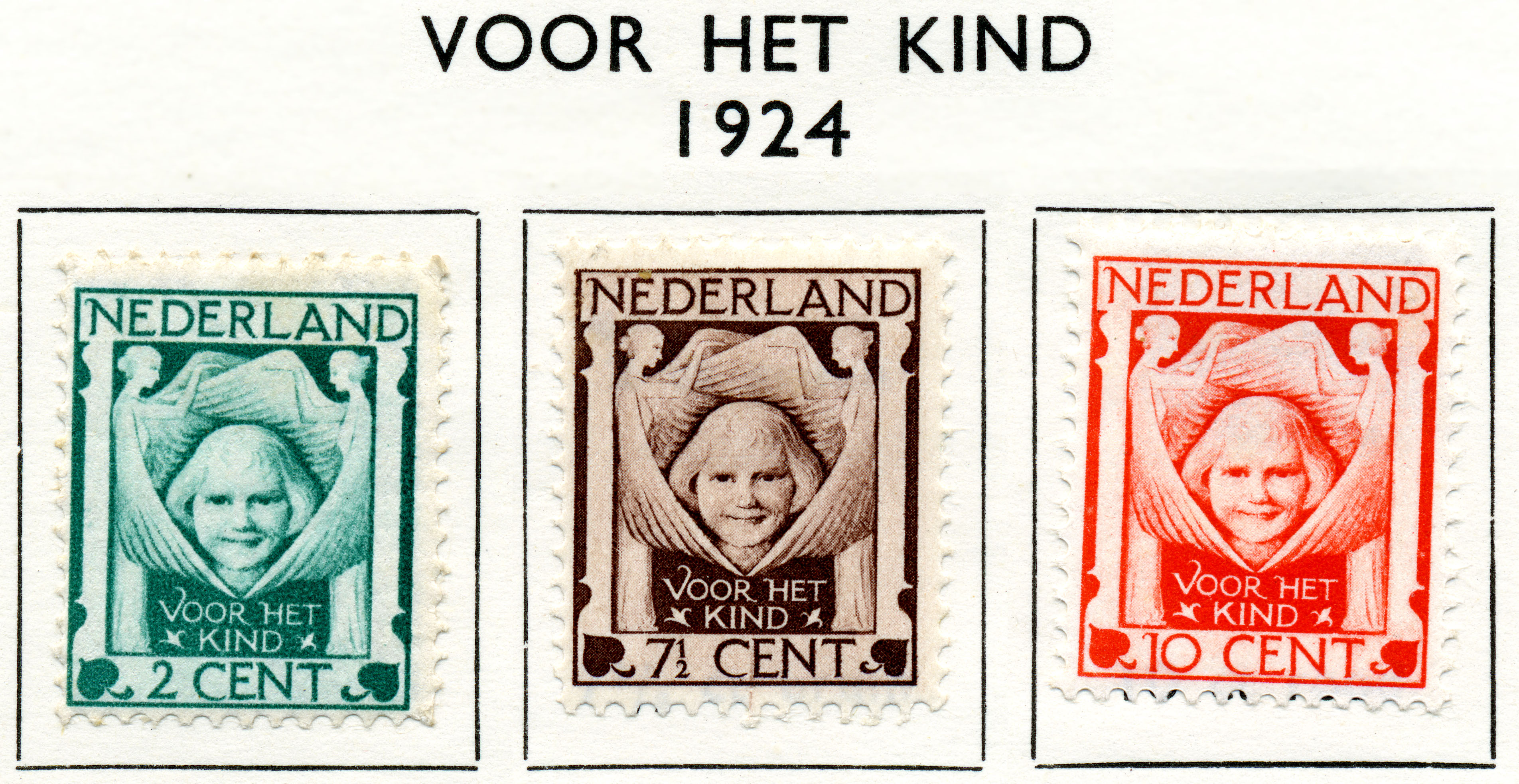 Kinderzegels (1924). NVPH nr 141-143. Ontwerp van Georg Rueter. Zijn dochter Maria (Hofker-)Rueter stond model voor de zegels.